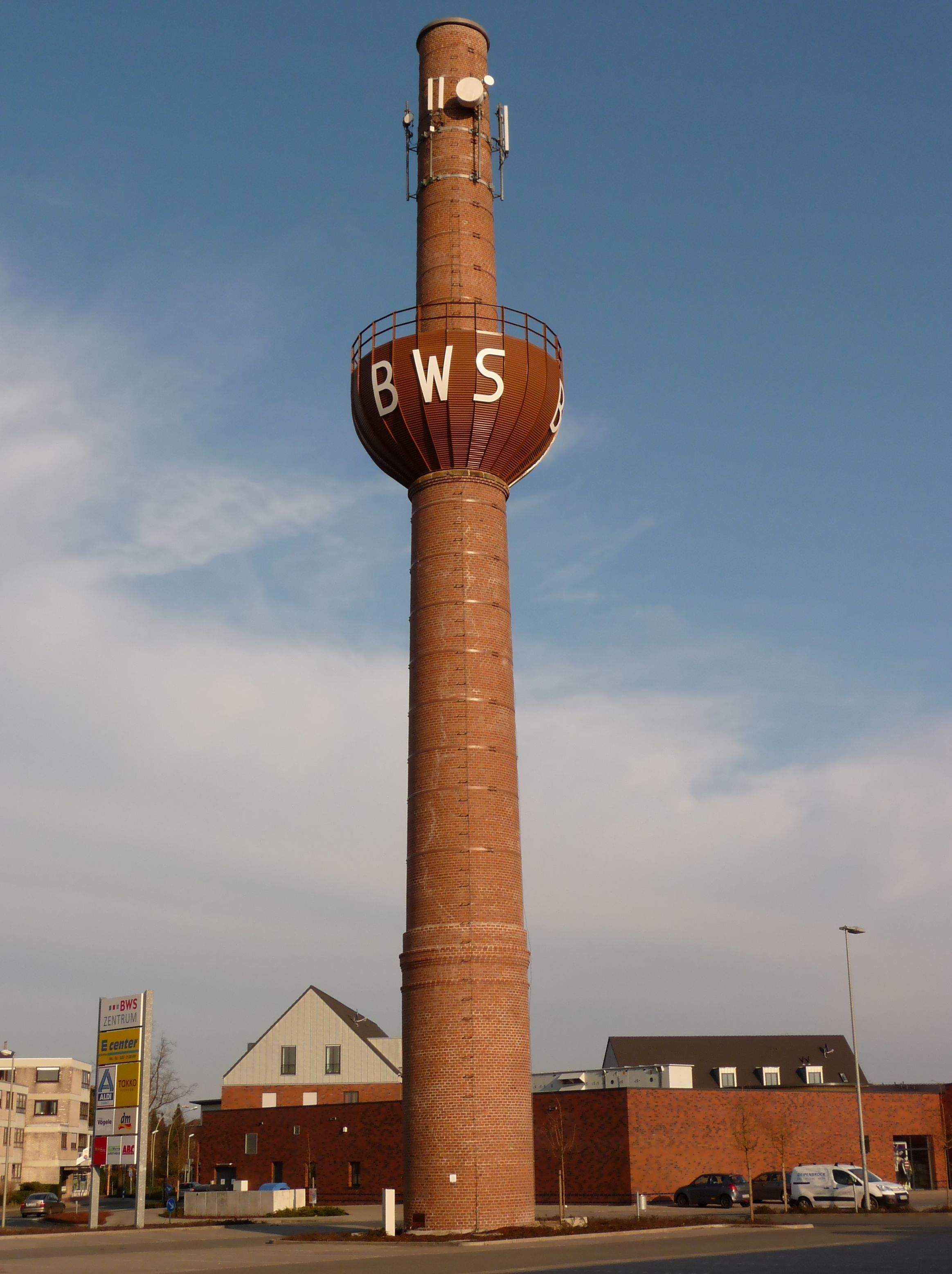 BWS-Turm am Einkaufszentrum (BWS-Center) in Borghorst (Steinfurt) .